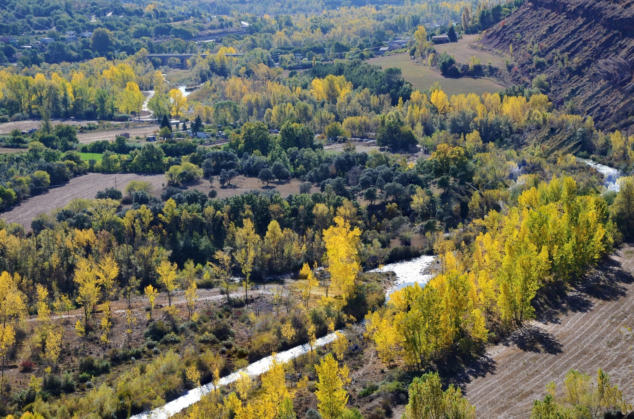 La Noguera Pallaresa sota Tremp